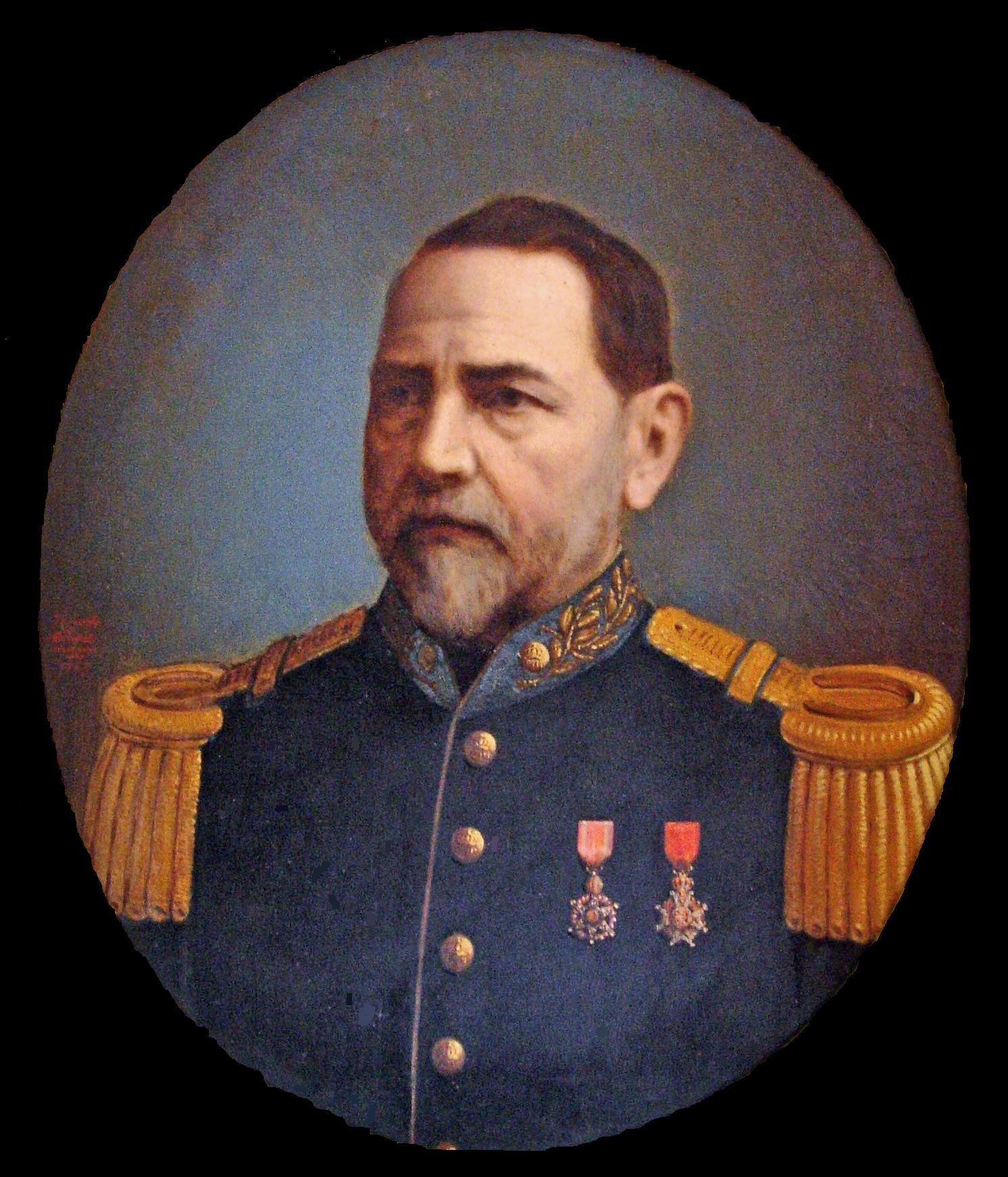 Leonardo Ferreira Marques, Baron of São Leonardo (1817-1894), author unknown. Ceará Museum, Fortaleza, Brazil.